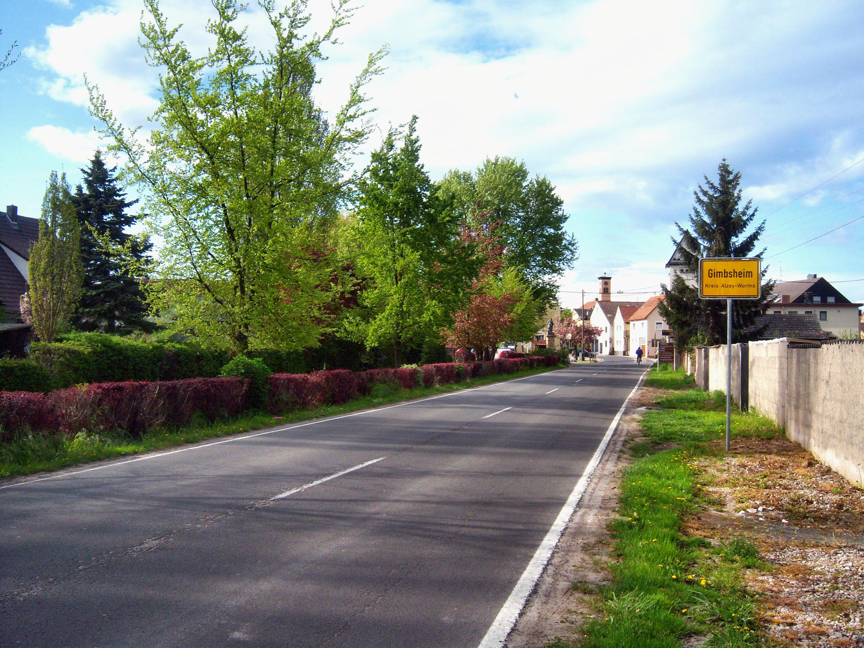 Ortseinfahrt der rheinhessischen Ortsgemeinde Gimbsheim, von Eich kommend